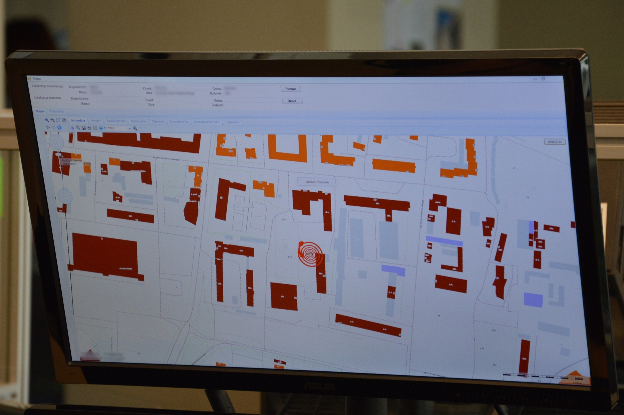 Centrum Powiadamiania Ratunkowego w Katowicach